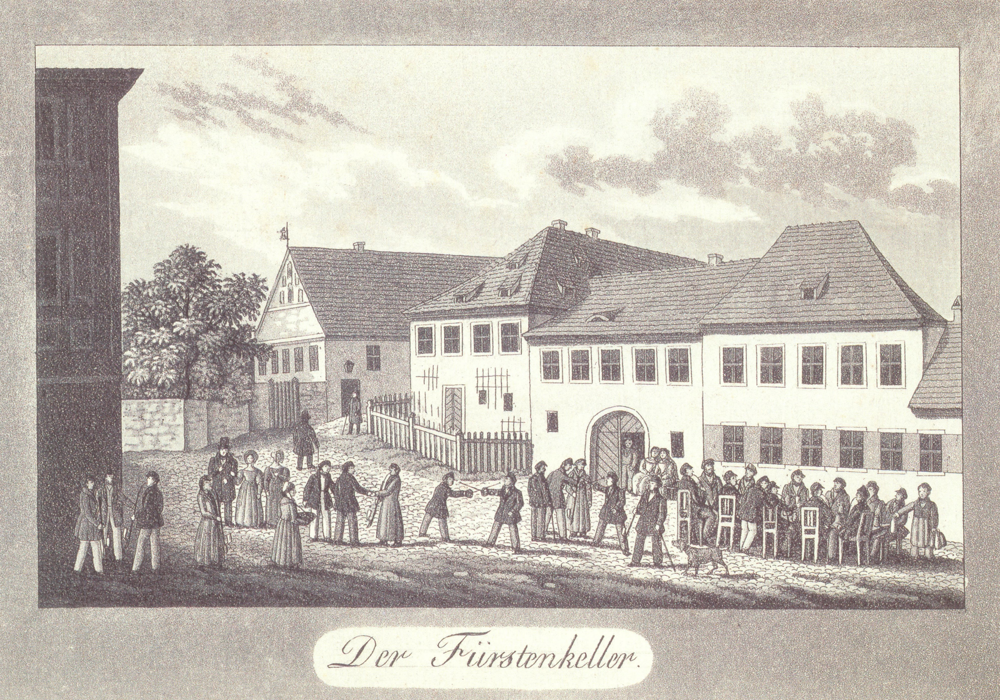 Der Fürstenkeller in Jena im Jahr 1841. Aquatintaradierung von Christian Carl Ludwig Hess (Kupferstecher, geb. 08.01.1776 in Weißenfels (Kreis Weißenfels), gest. 13.02.1853 in Jena, Schaffenszeit: 1795-1853 in Deutschland).